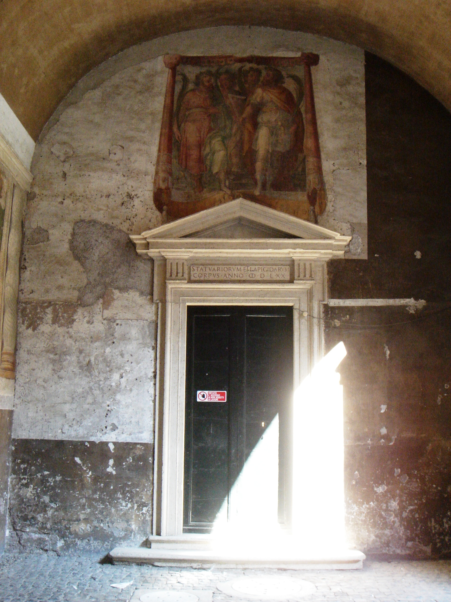 Roma, Basilica dei Santi Quattro Coronati: Confraternita dei Marmorari nel portico d'ingresso